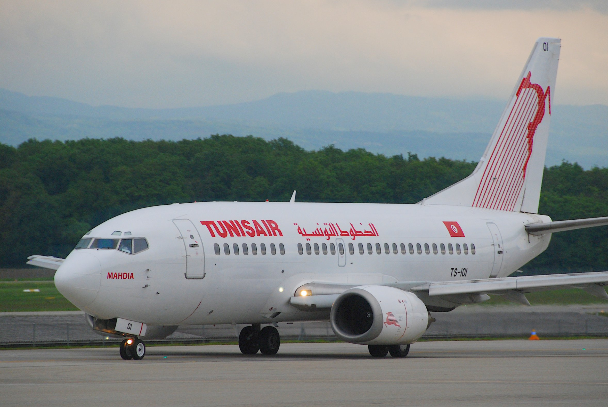 Tunisair Boeing 737-500; TS-IOI@GVA;13.05.2010/572af